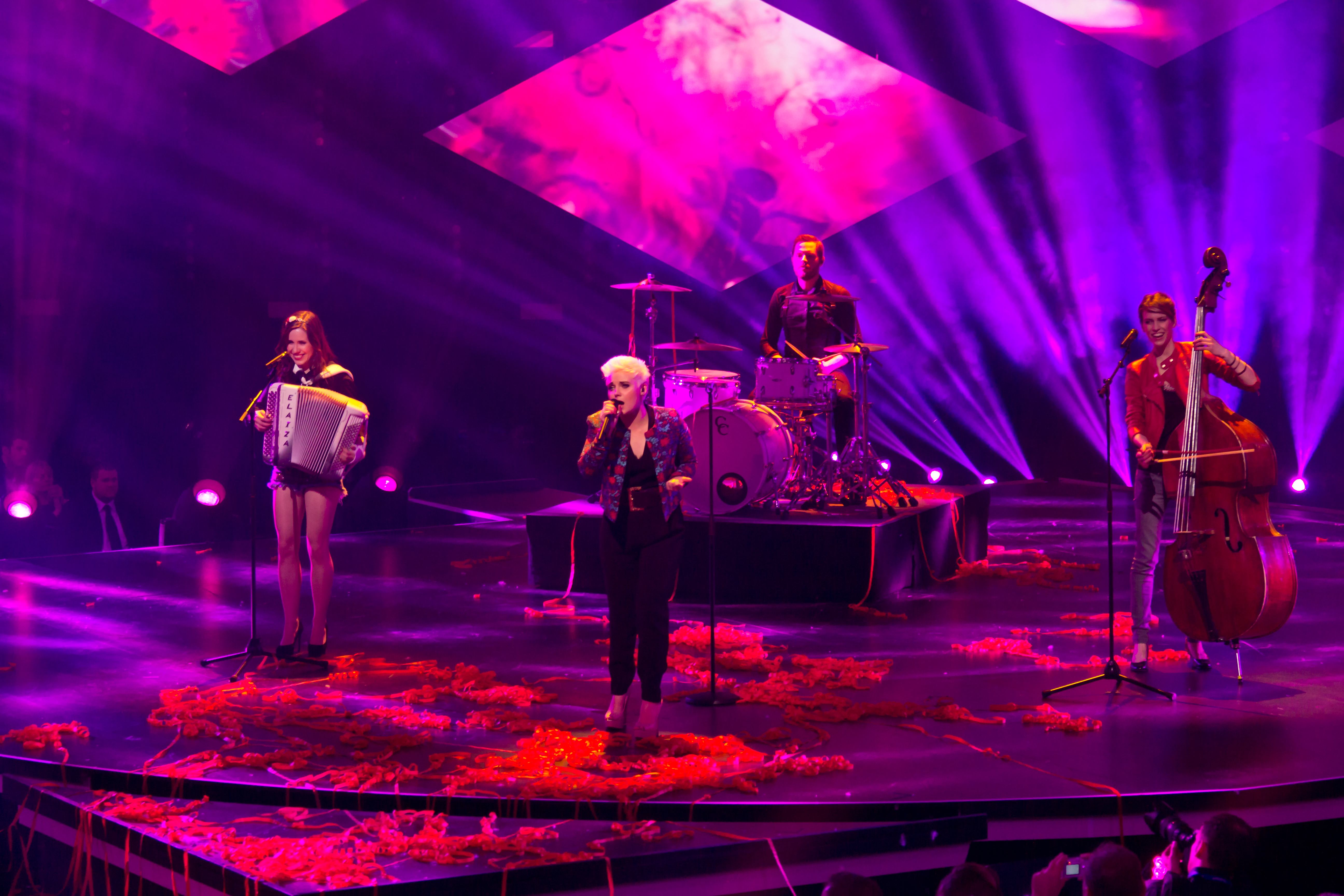 Unser Song für Dänemark - LivesendungFoto: Auftritt von Elaiza